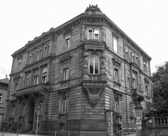 Villa Bohnenberger in Stuttgart von Architekt Carl Beisbarth, 1872